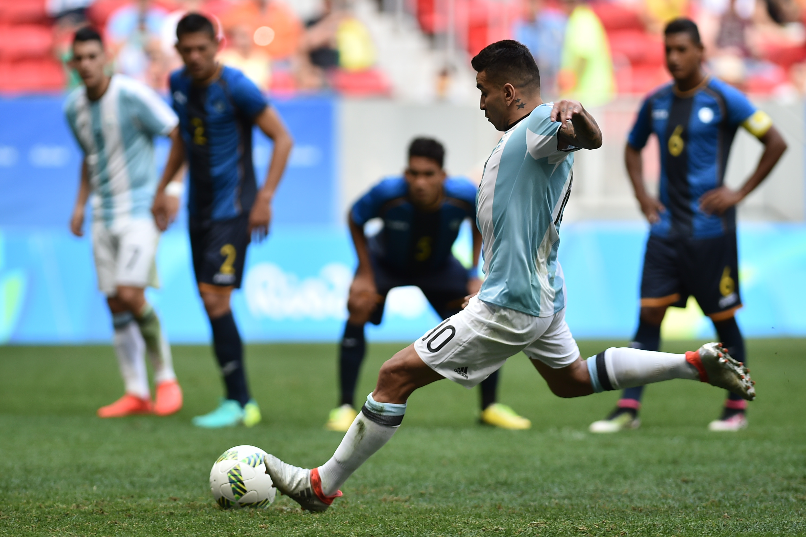 Estádio Nacional de Brasília Mané Garrincha, Brasília, DF, Brasil, 10/8/2016 Foto: Andre Borges/Agência Brasília Argentina e Honduras empataram por 1x1 nesta quarta-feira (10), no Estádio Mané Garrincha, em partida pelo grupo D do futebol masculino nas Olimpíadas 2016. O placar classificou Honduras para a próxima fase da competição e tirou a seleção argentina masculina da Olimpíada. Partido entre Argentina y Honduras por fase de grupos.